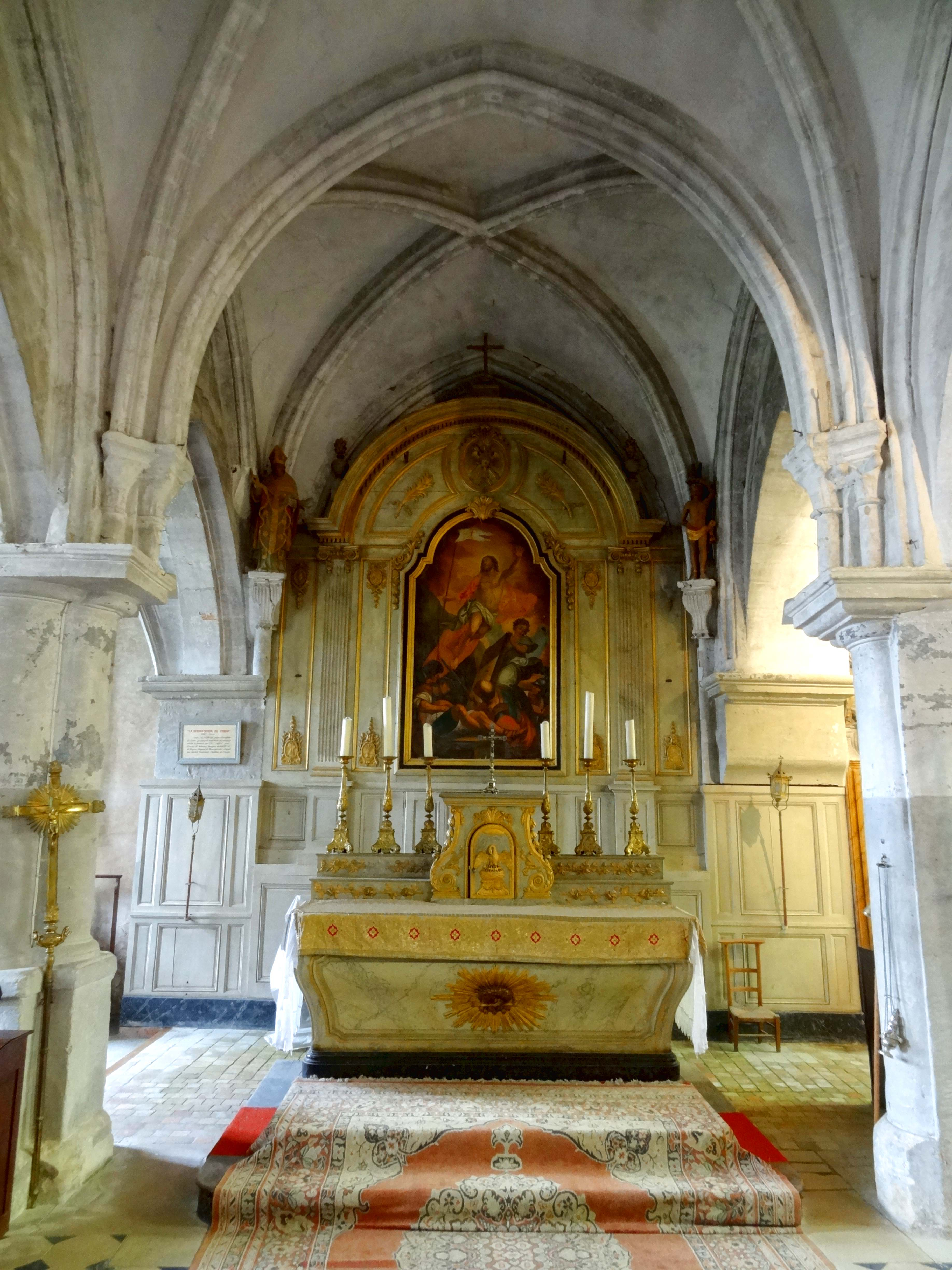 Intérieur de l'église - voir titre.